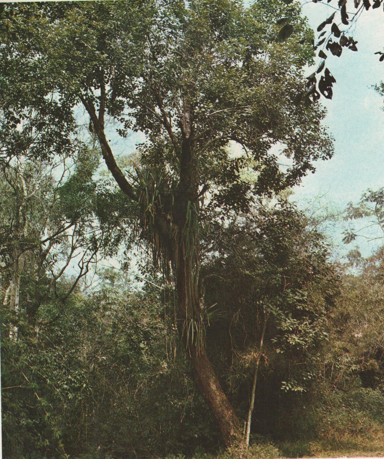 Ejemplar de Alchornea iricurana Alchornea glandulosa en Argentina.